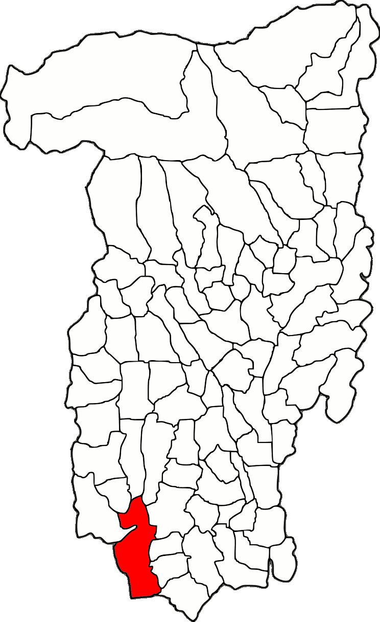 Lage der Stadt Bălcești im Kreis Vâlcea (RO).